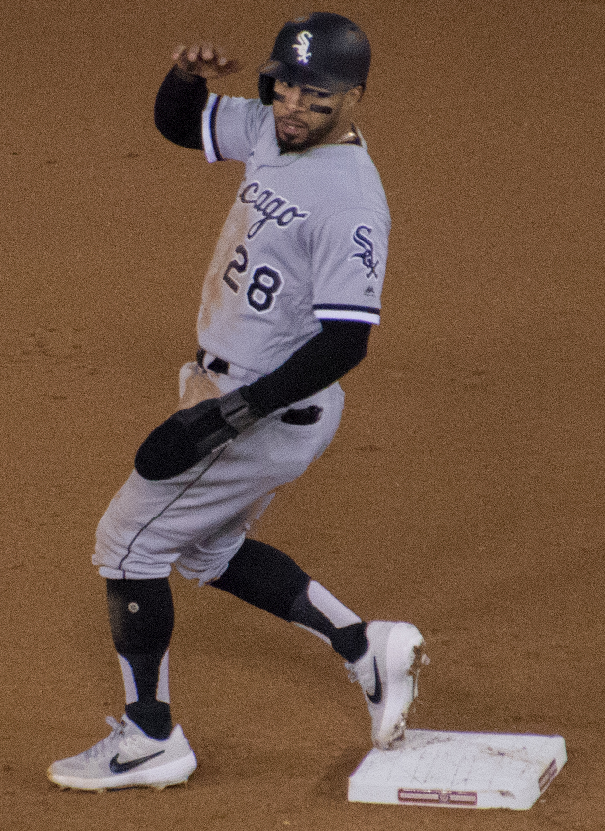 Leury García